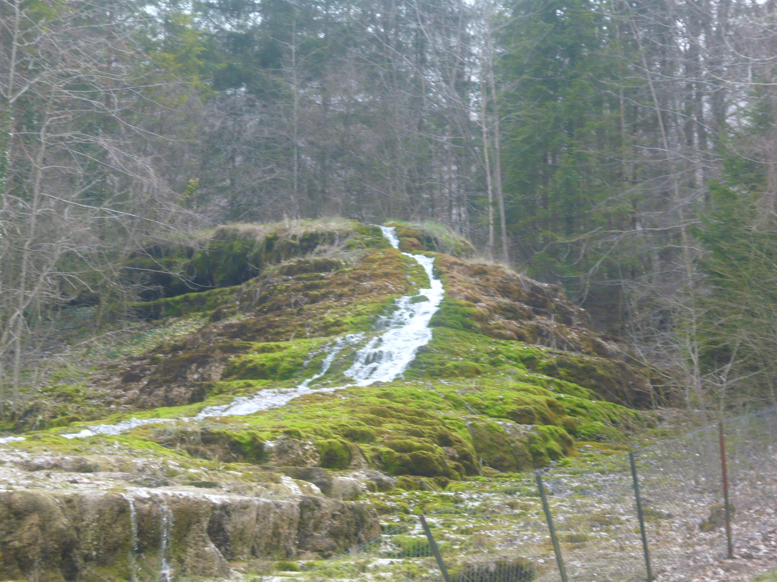 cascade pétrifiante d'étuf en haute-marne dans le village de Rouvres-sur-Aube.